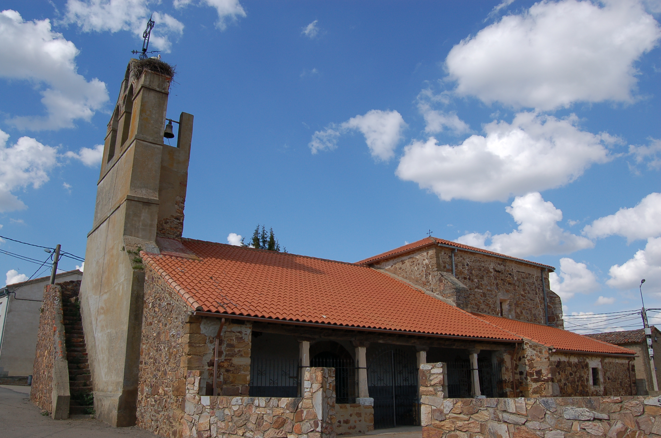 Igrexa de Milles de la Polvorosa